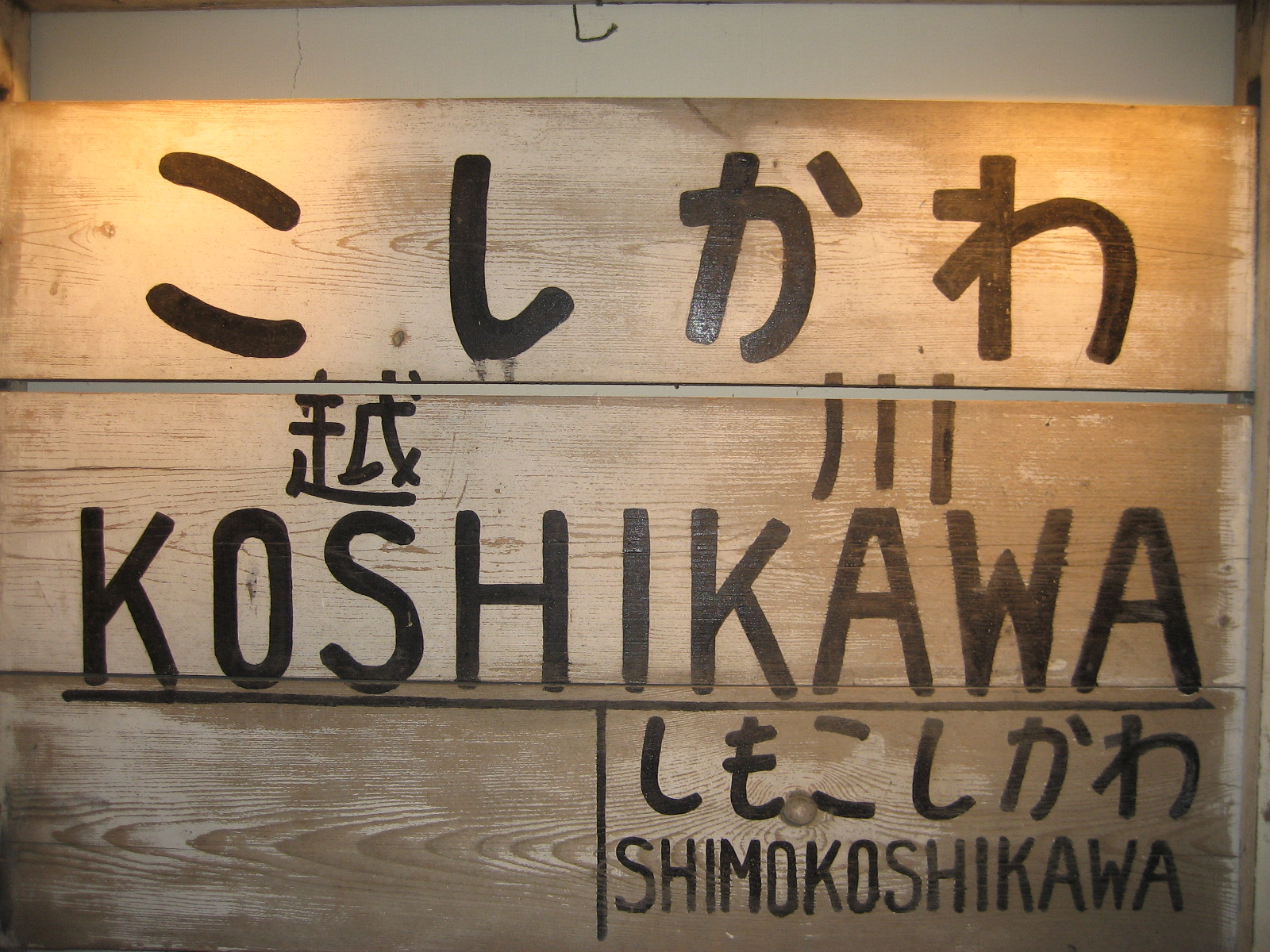 根北線越川駅駅名標（斜里町知床博物館所蔵）